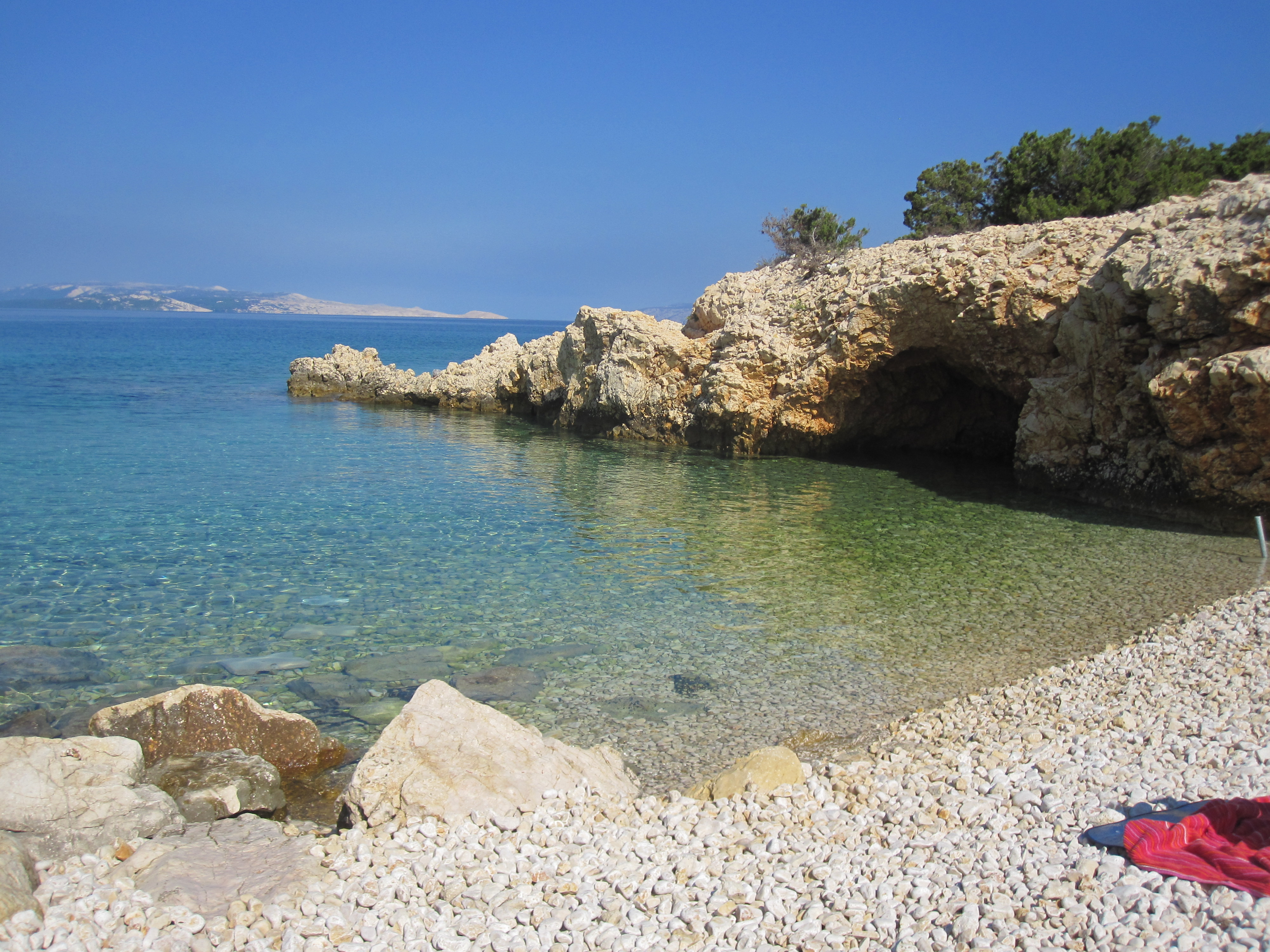 Stara Novalja, Croatia